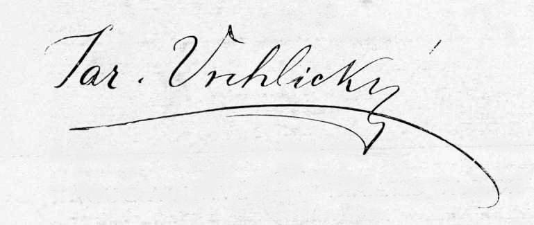 Jaroslav Vrchlický (1853–1912); Podpis